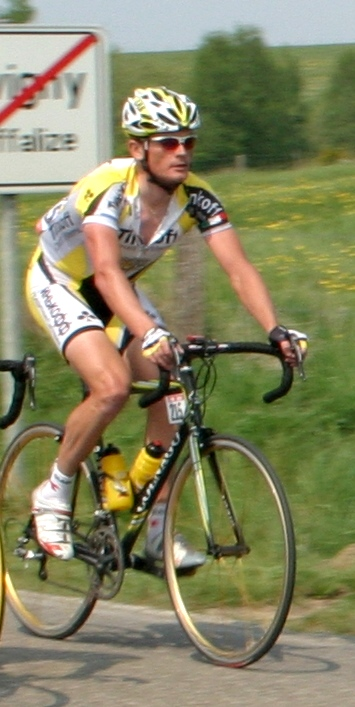 De Vasil Kiryienka 2007 a Liège-Bastogne-Liège.